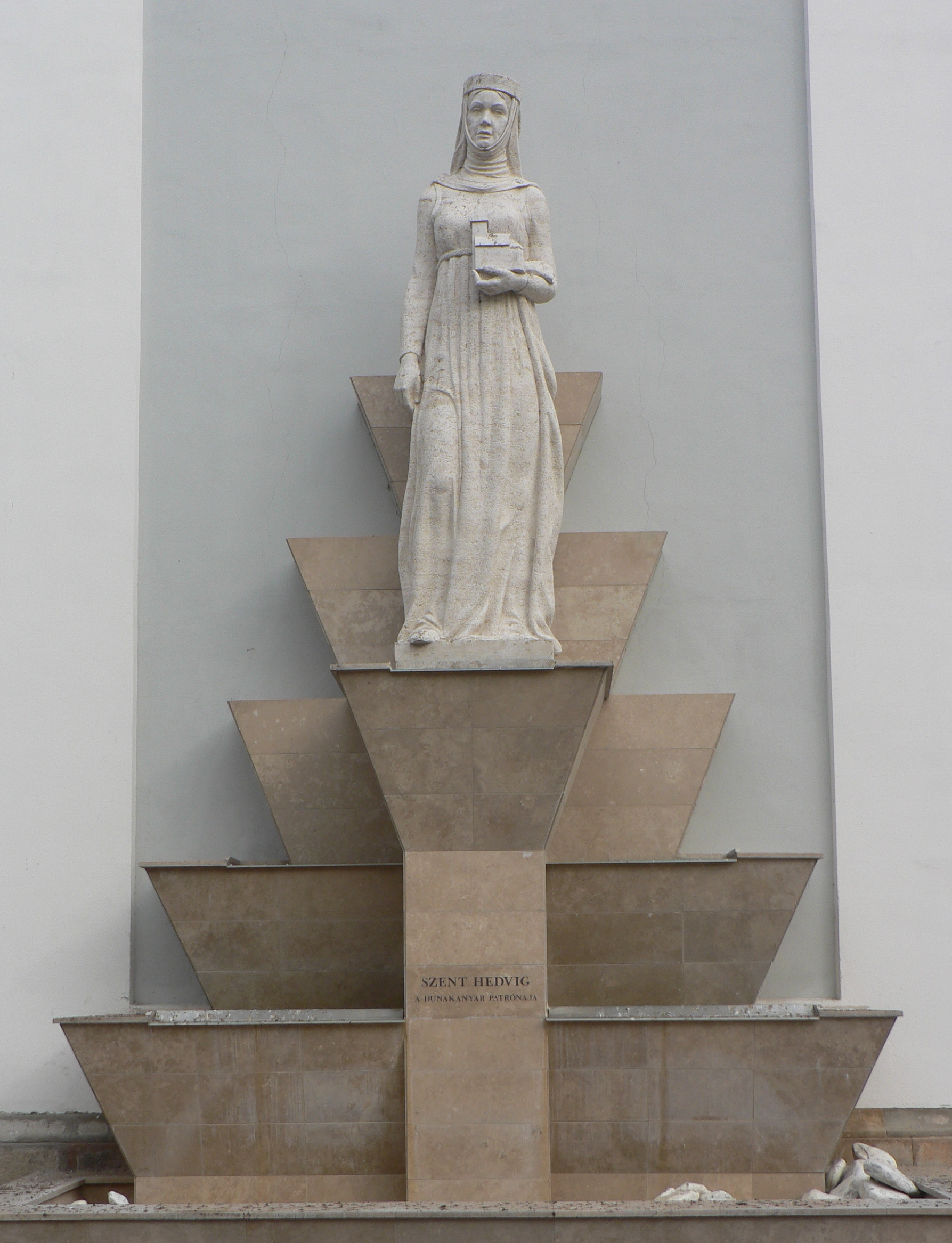 Pomnik Św. Jadwigi Andegaweńskiej w mieście Vác